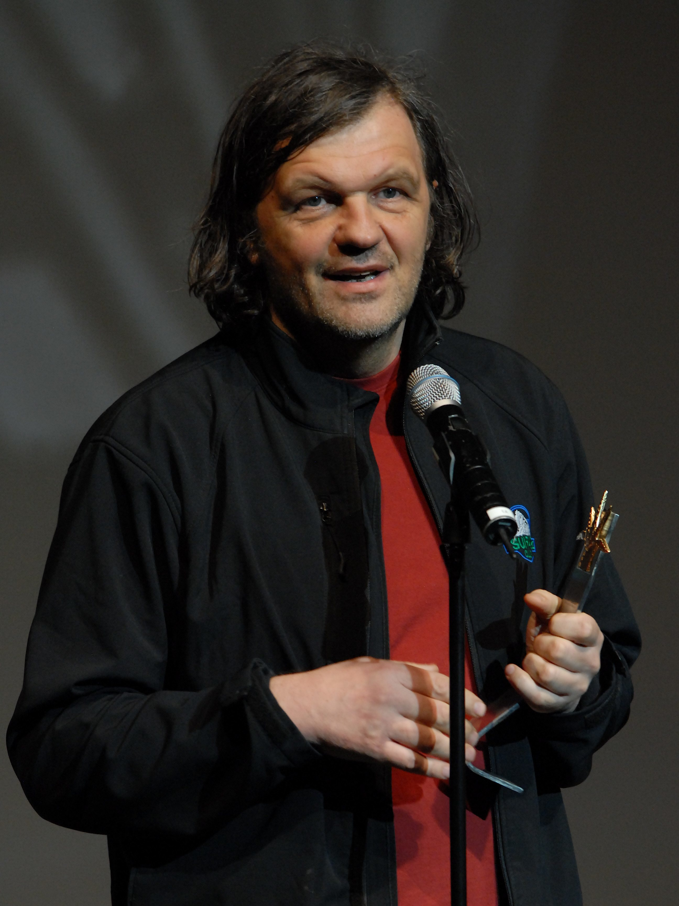 Emir Kusturica recibió de manos de Guadalaupe Ontiveros el Mayahuel de Plata en su versión Premio Guadalajara Internacional de esta edición del FICG24.